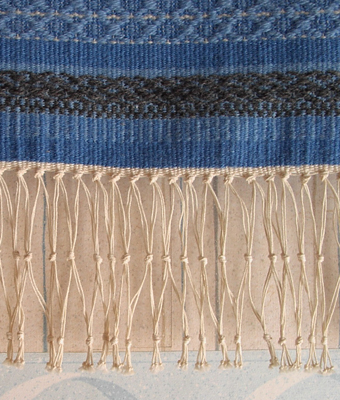 Knutmönster i frans. (I en vepa med rosengång i ull.) Se andra fransar på: Drejad frans och Femflätad linfrans